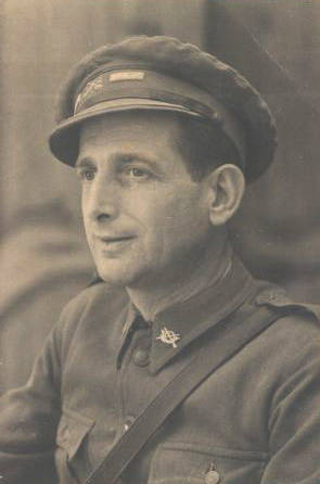 El teniente Amado Granell Mesado, primer soldado aliado en entrar en París tras su liberación durante la Segunda Guerra Mundial. Imagen de la Guerra Civil Española